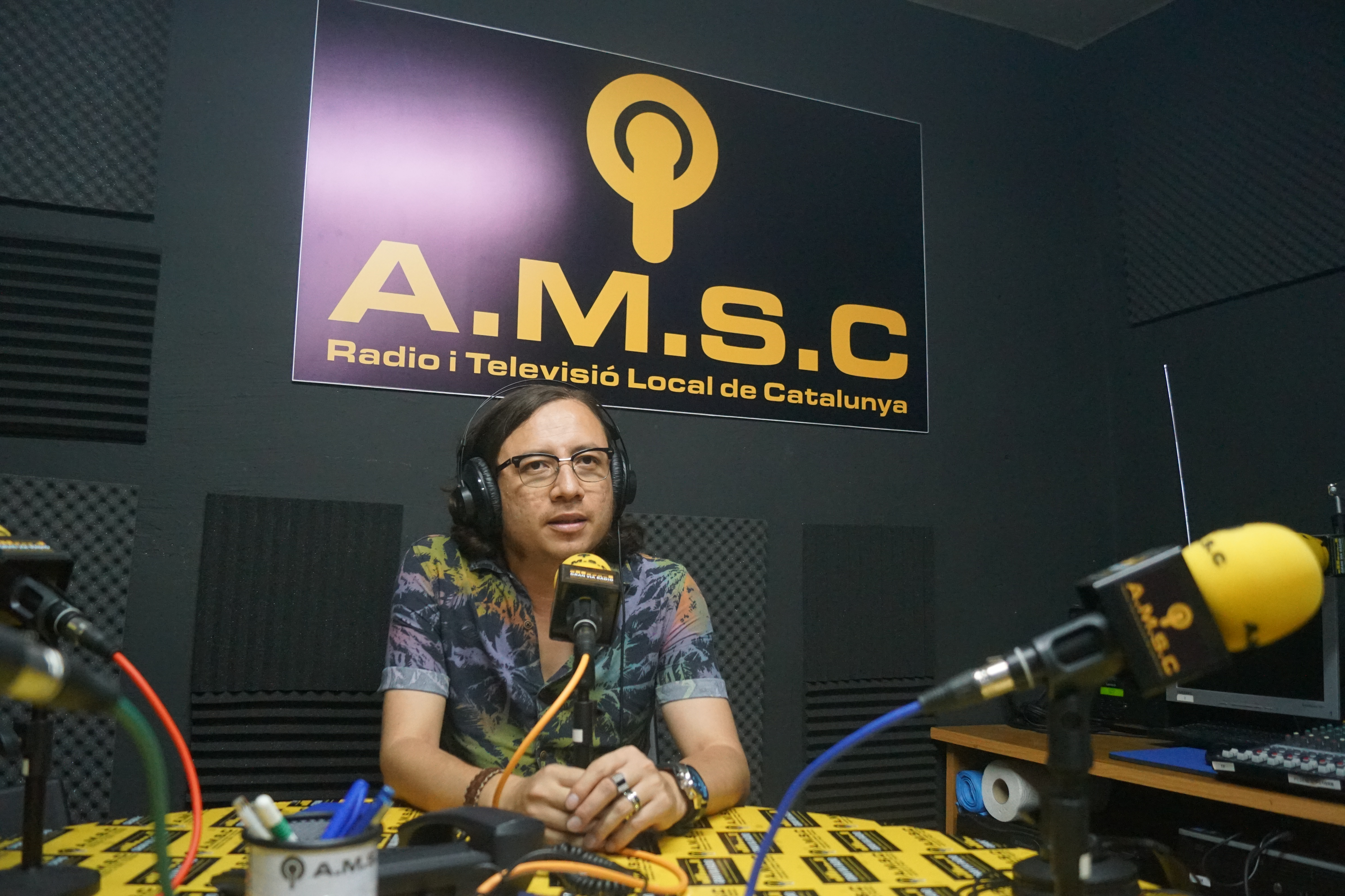 Robles en directo por GRAN VIA RADIO